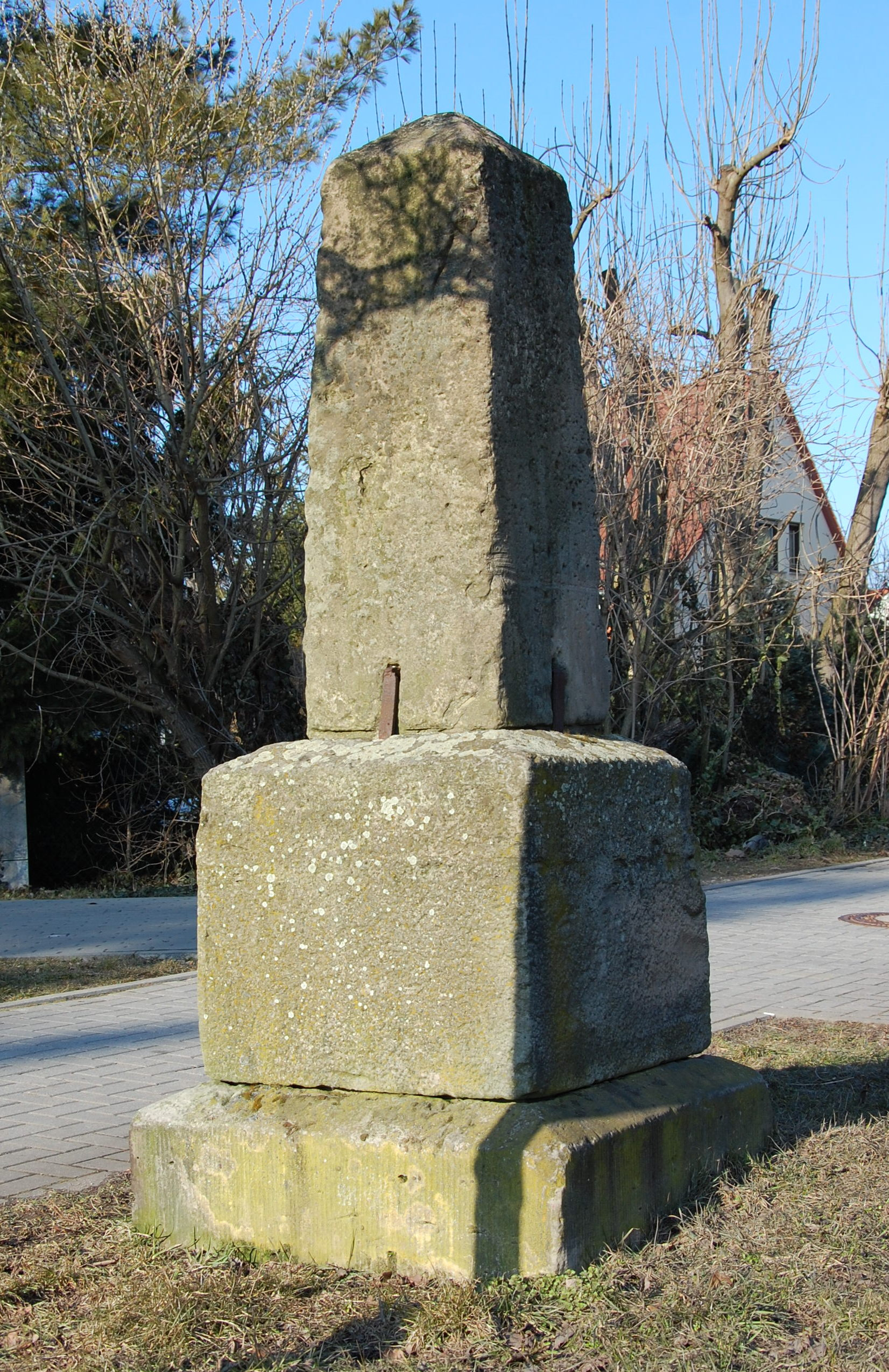 Distanzstein Wanzleber Chaussee